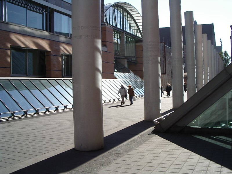 Beschreibung Nürnberg, Germanisches Nationalmuseum, »Straße der Menschenrechte« von Dani Karavan und Haupteingang v. SW (2003-10-17) Quelle Fotographie 2003-10-17 Fotograph --Keichwa Copyright Status GNU Freie Dokumentationslizenz Vgl. Bild:nuernberg gnm haupteingang v sw.jpg